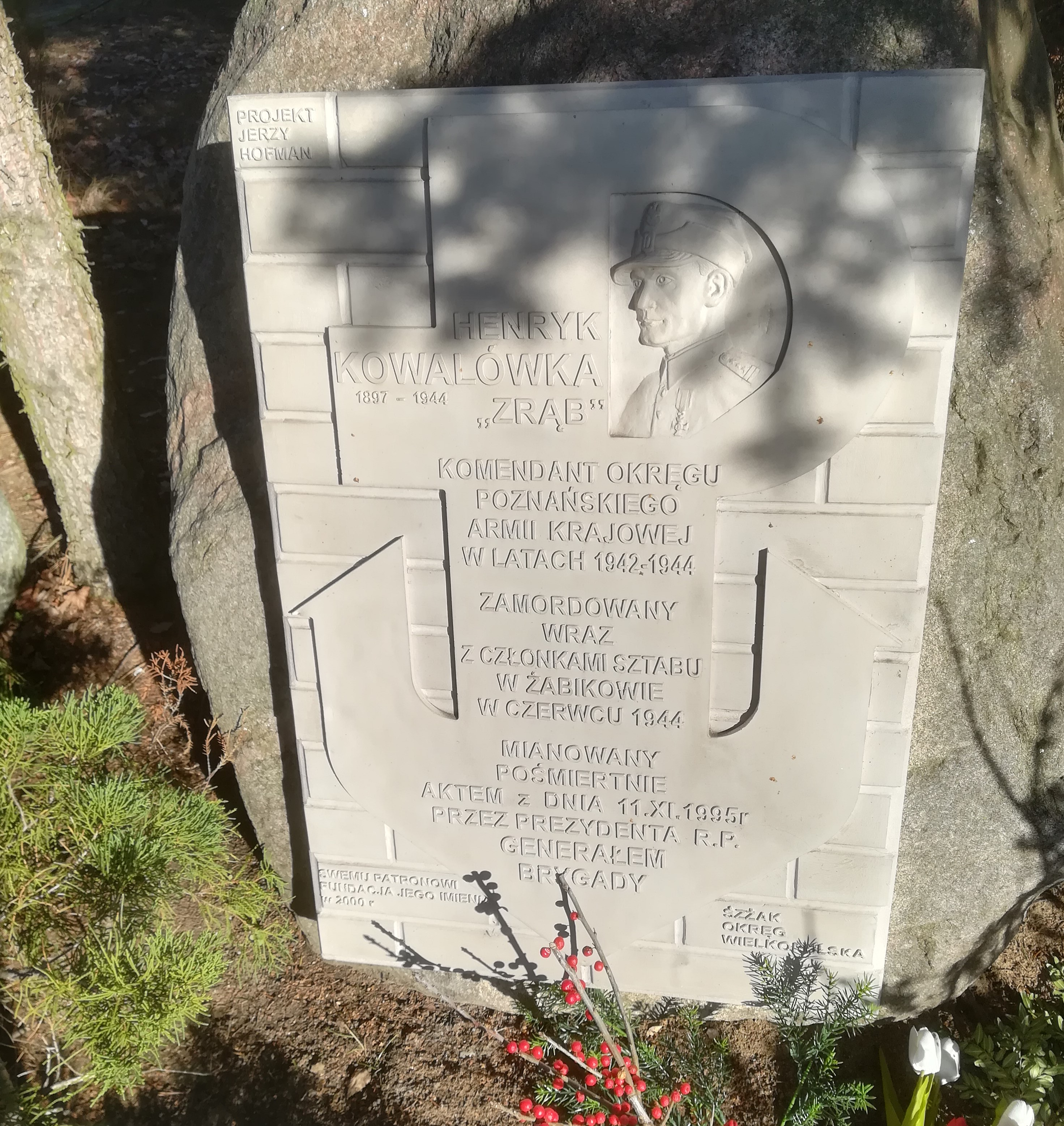 Pomnik Henryka Kowalówki na cmentarzu junikowskim w Poznaniu.